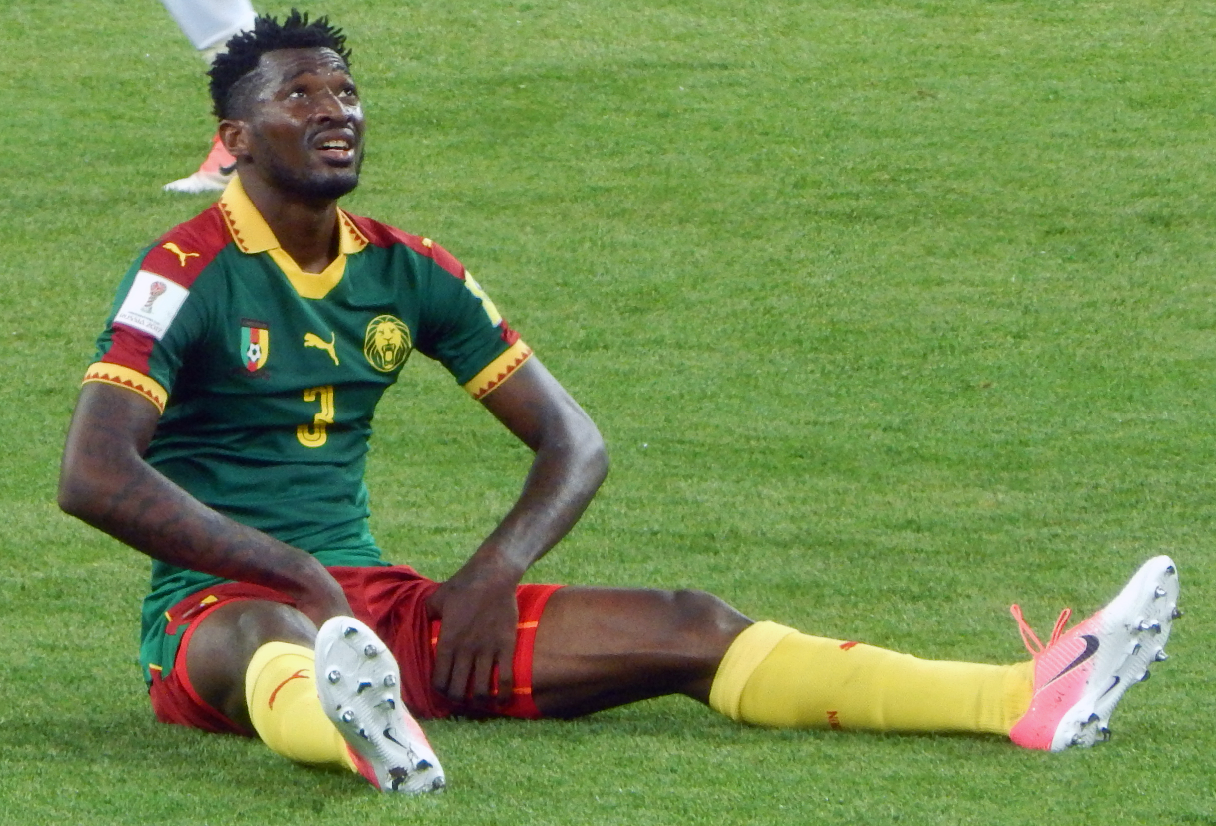 Андре-Франк Замбо во время матча против сборной Чили